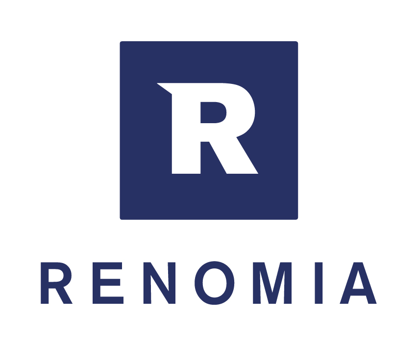 Logo společnosti RENOMIA, a.s.